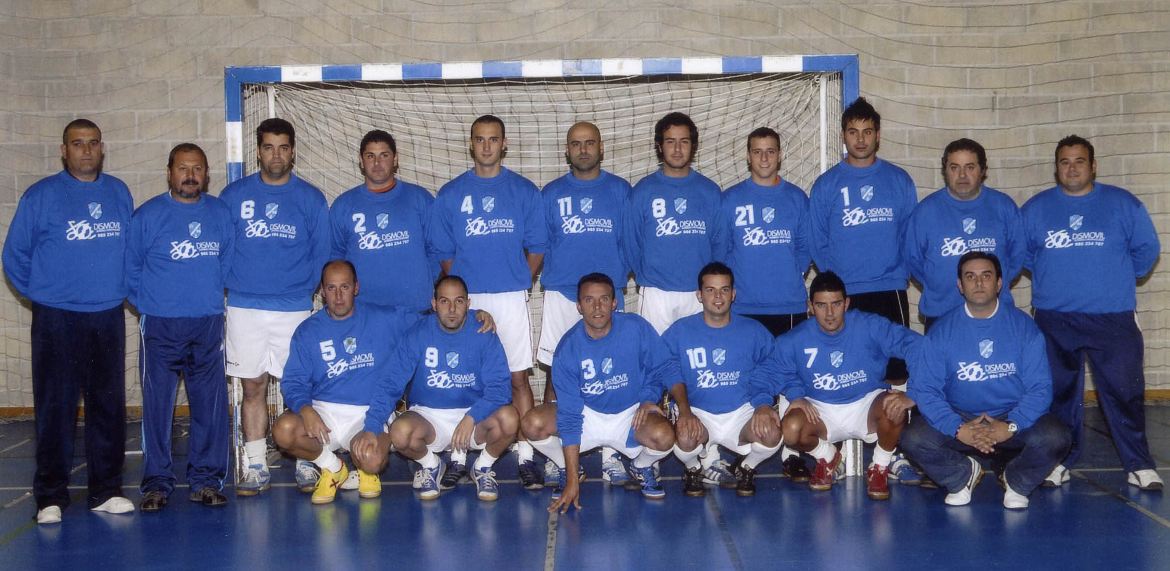 Plantilla Oviedo Sport Fs 07-08